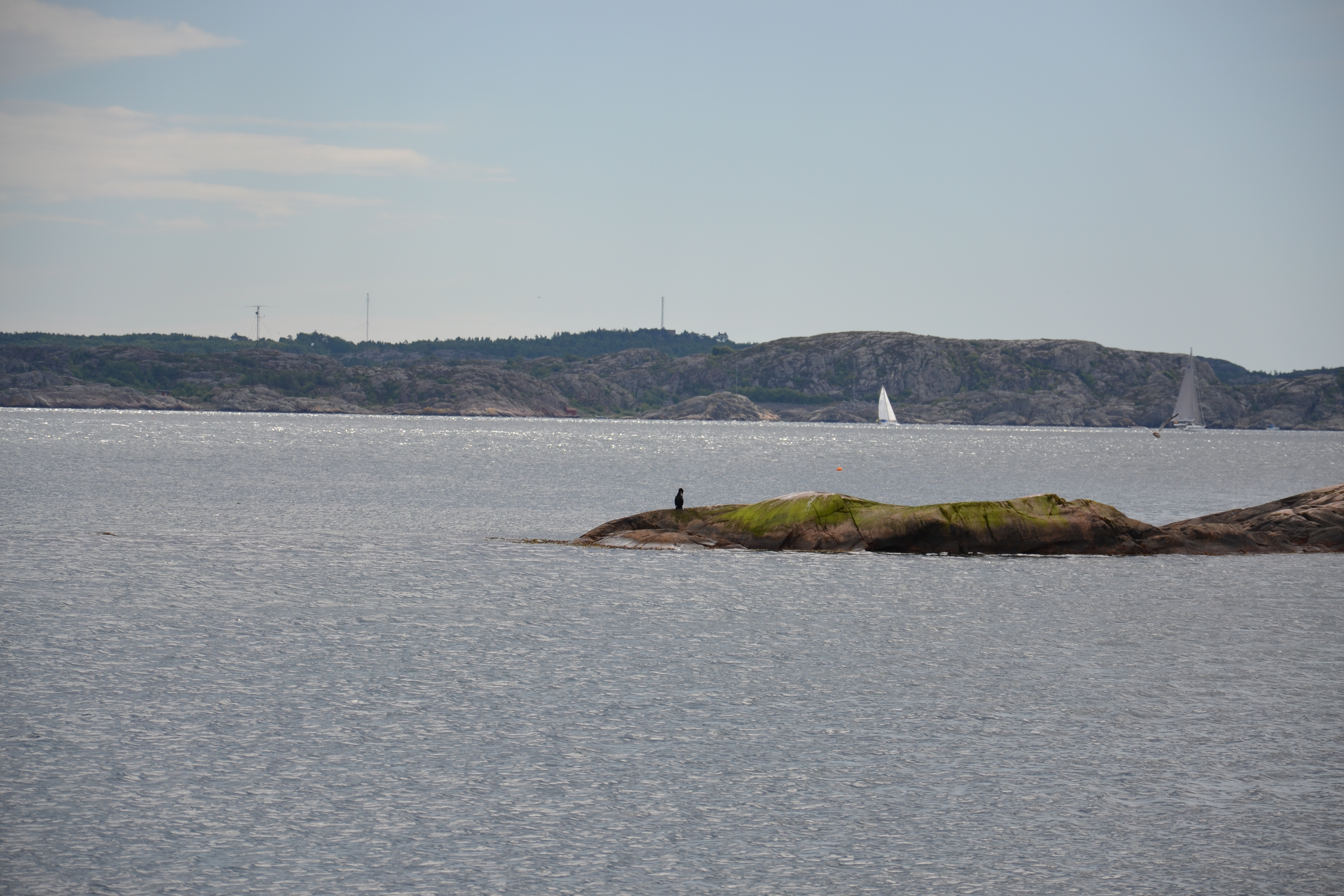 Stångehuvud år 2015.